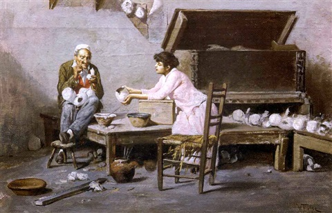 Vincenzo Volpe (1855-1929), Restaurando i putti di gesso (La Réparation des angelots de plâtre), huile sur toile (1885), 20 x 40 cm, collection particulière.